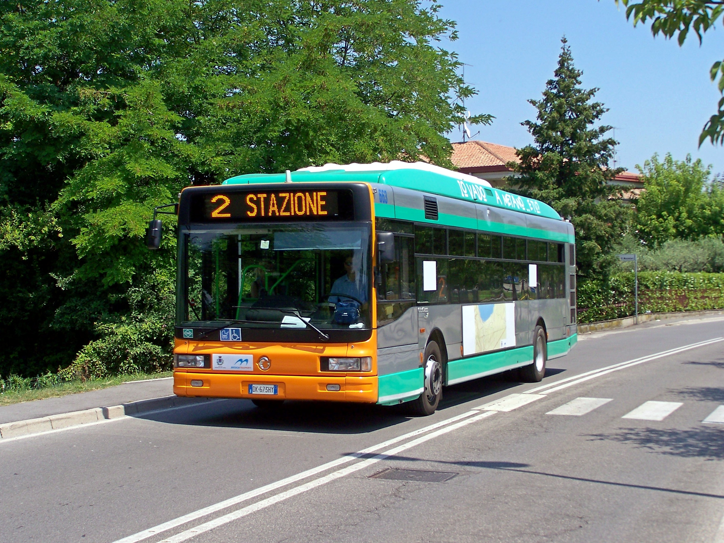 L'Irisbus CityClass 663 di Brescia Trasporti mentre espleta servizio sulla linea 2 di Desenzano del Garda in direzione della Stazione